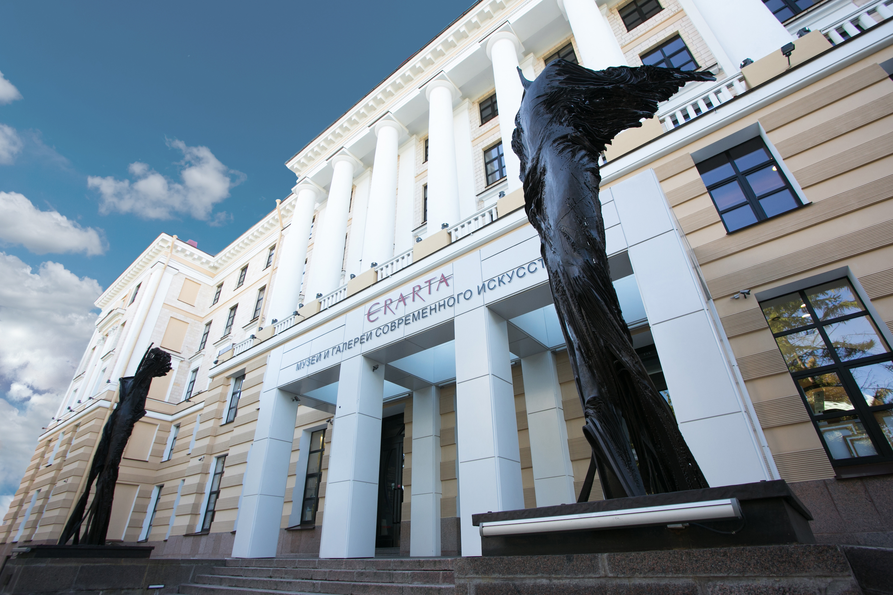 Санкт-Петербург, Васильевский остров, ул. 29-я Линия, дом 2, Музей современного искусства Эрарта